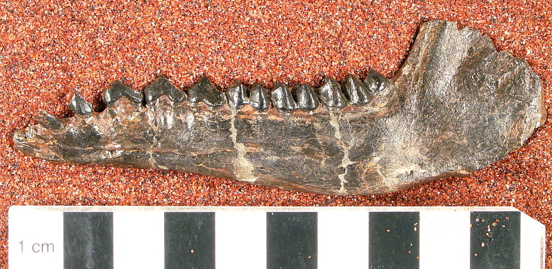 Protylopus annectens Peterson